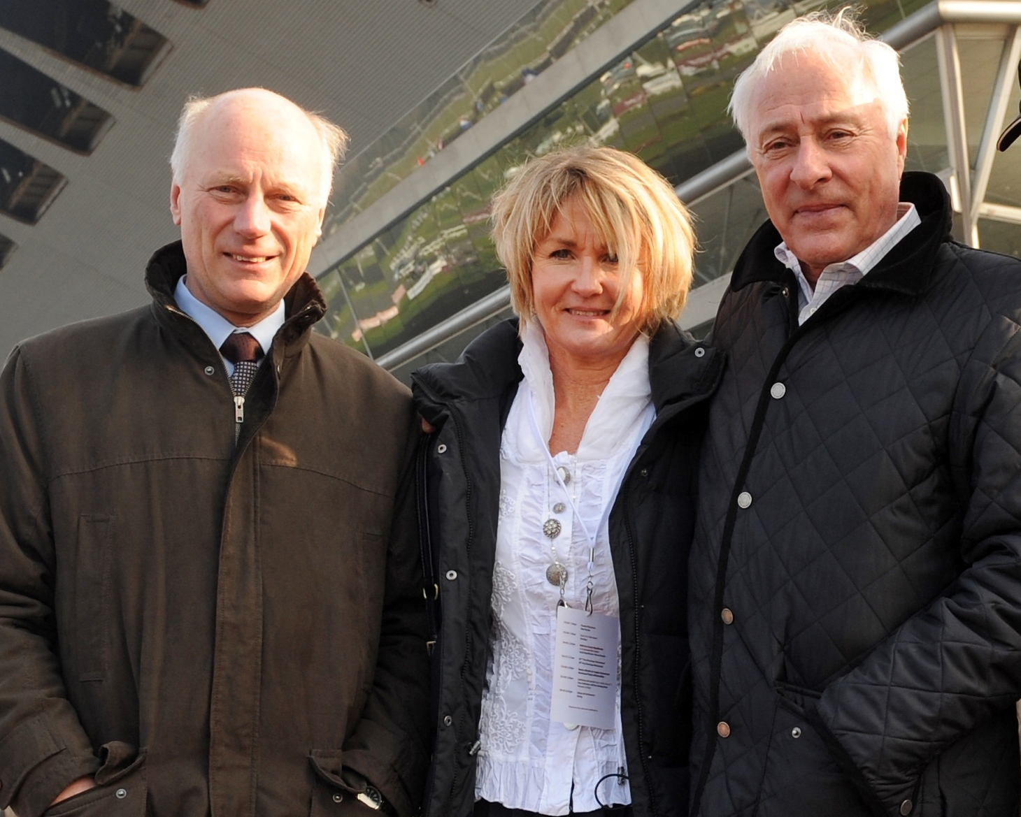 Travkuskarna (från vänster): Stig H Johansson, Helen A. Johansson och Berndt Lindstedt.